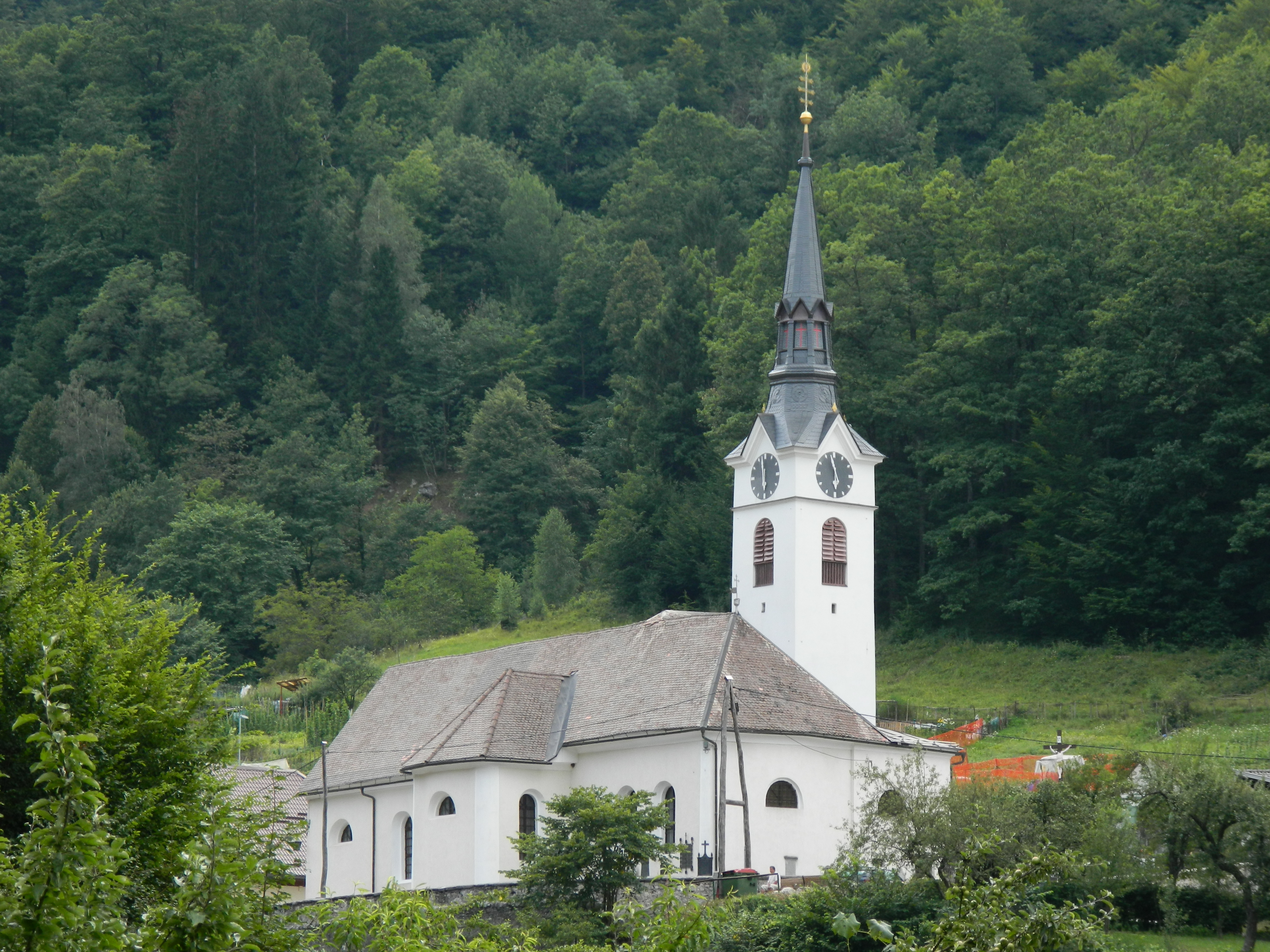 Župnijska cerkev Svetega Lenarta, Kropa